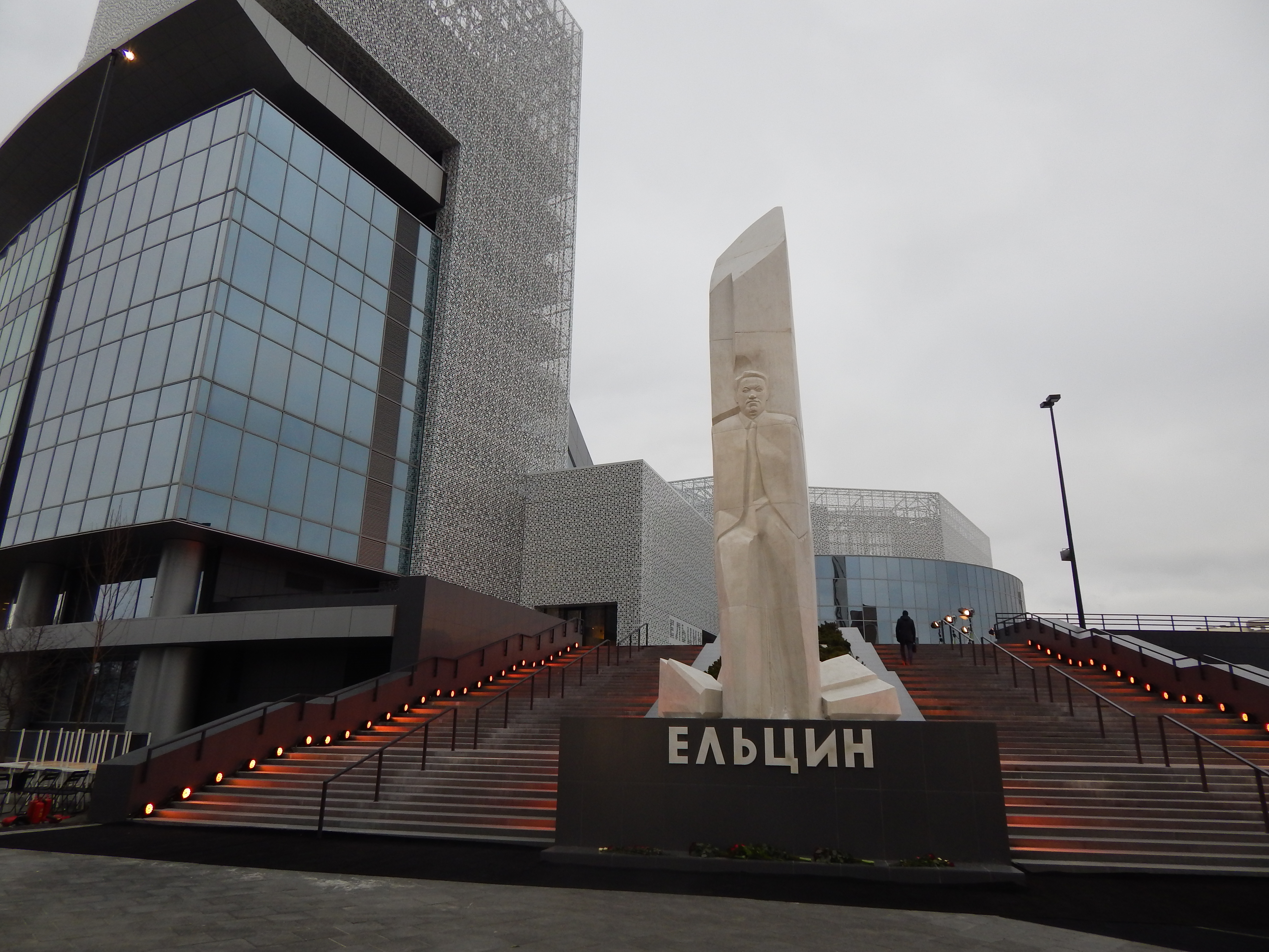 Ельцин-центр днём